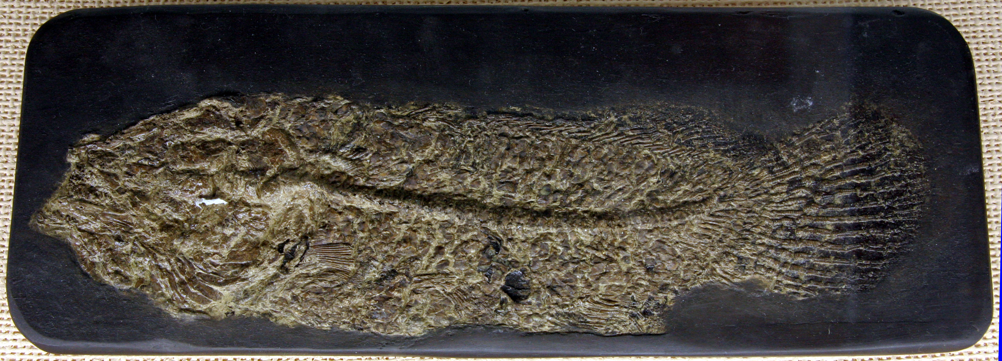 Ein Schlammfisch (Cyclurus kehreri, früher Amia kehreri) aus der Grube Messel. Das Fossil befindet sich im Museum des Institutes für Geowissenschaften an der Ruprecht-Karls-Universität in Heidelberg (Im Neuenheimer Feld 234) [1]